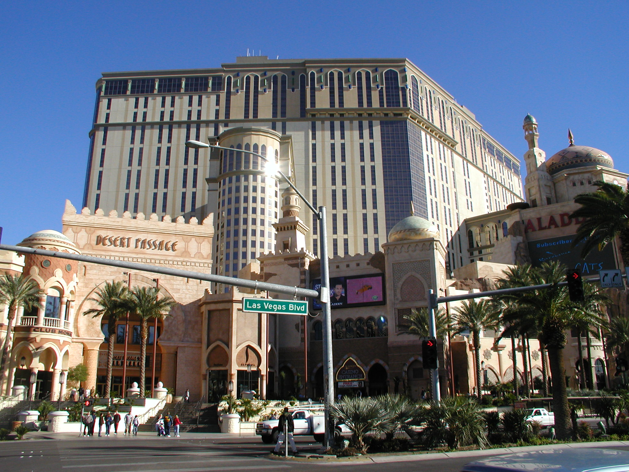 Foto tirada por mim (Vicente Sloboda) no começo de 2004. Na cidade de Las Vegas na Las Vegas Boulevard, mais conhecida como "STRIP". Nesta avenida ficam localizados os maiores cassinos da cidade.